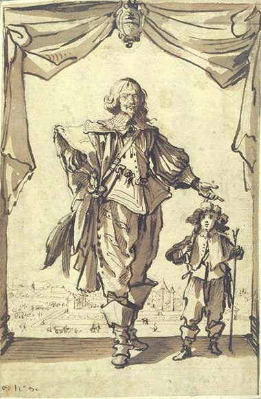 Portrait of Claude Deruet, by Jacques Callot (Nancy 1592-1635), Louvre.